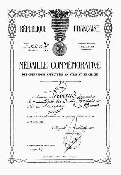 MÉDAILLE COMMÉMORATIVE DE SYRIE-CILICIE